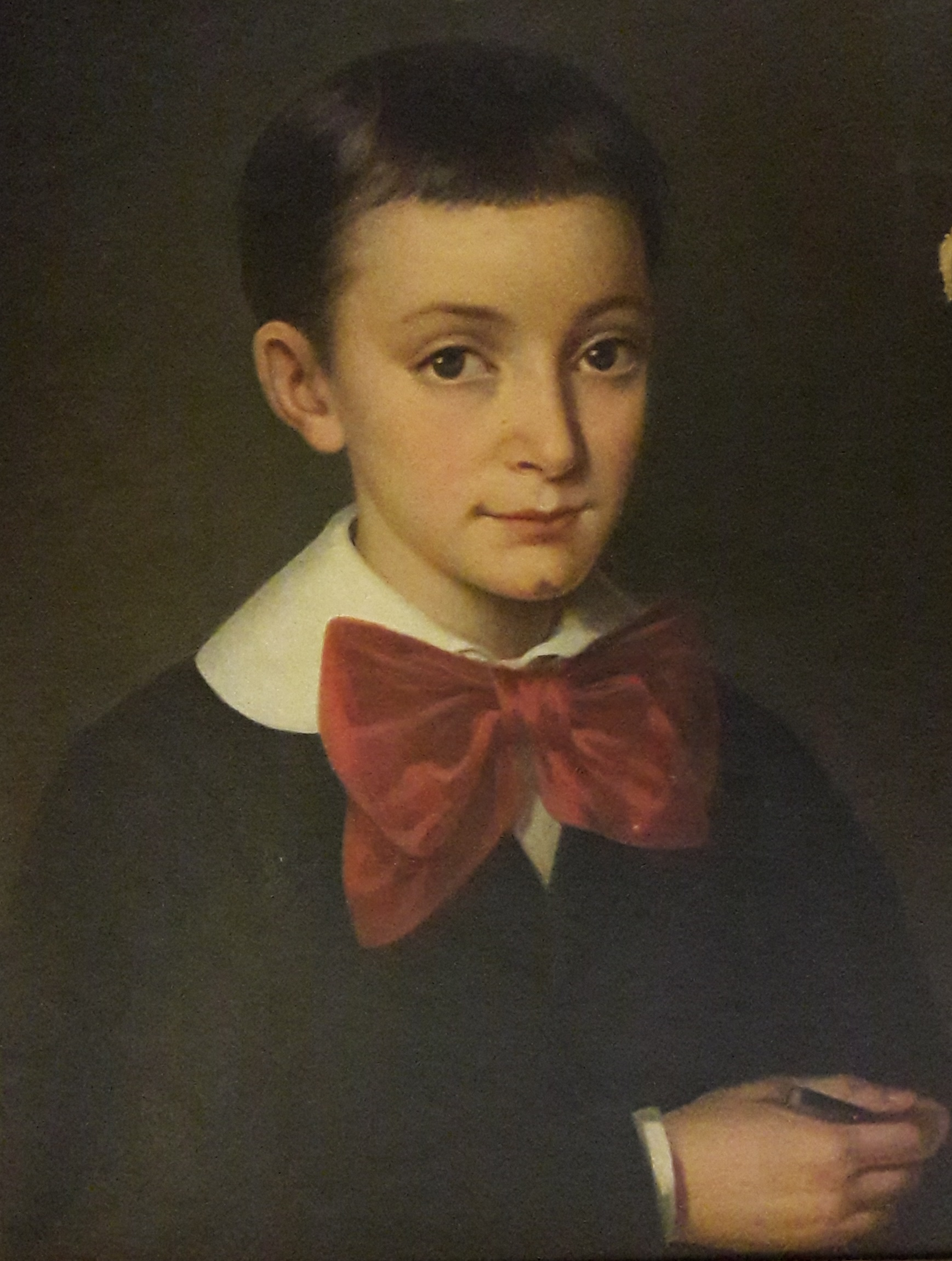 Attribué à Ernestine Cabart, Portrait présumé de Raymond Persin, 1881, localisation inconnue.